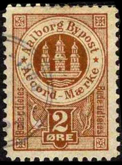 Почтовая марка частной почты Ольборга, 1884-1889 гг.